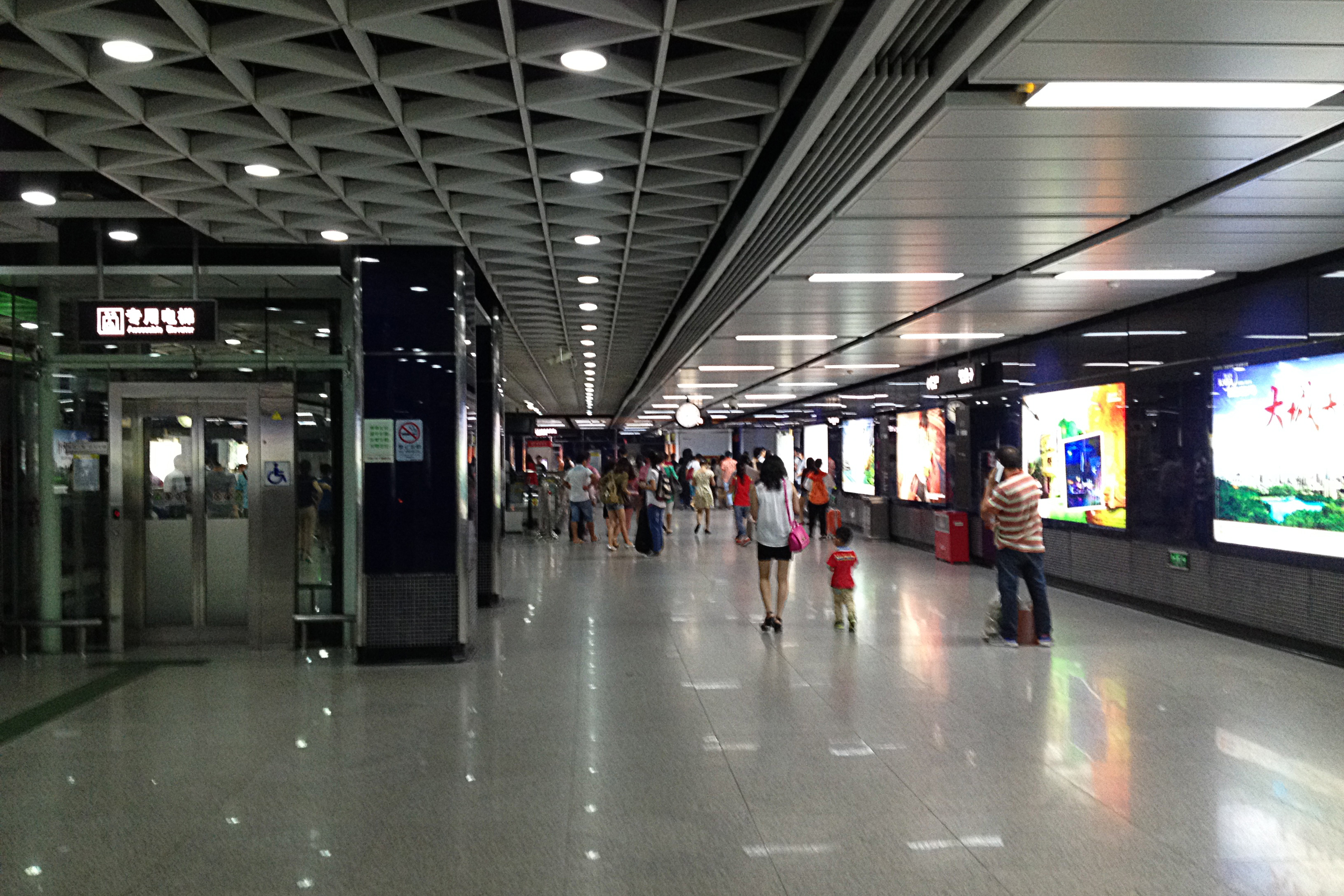 广州地铁大沙地站站厅